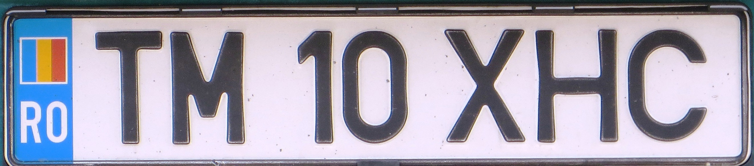 kentekenplaat uit Roemenië - Timișoara